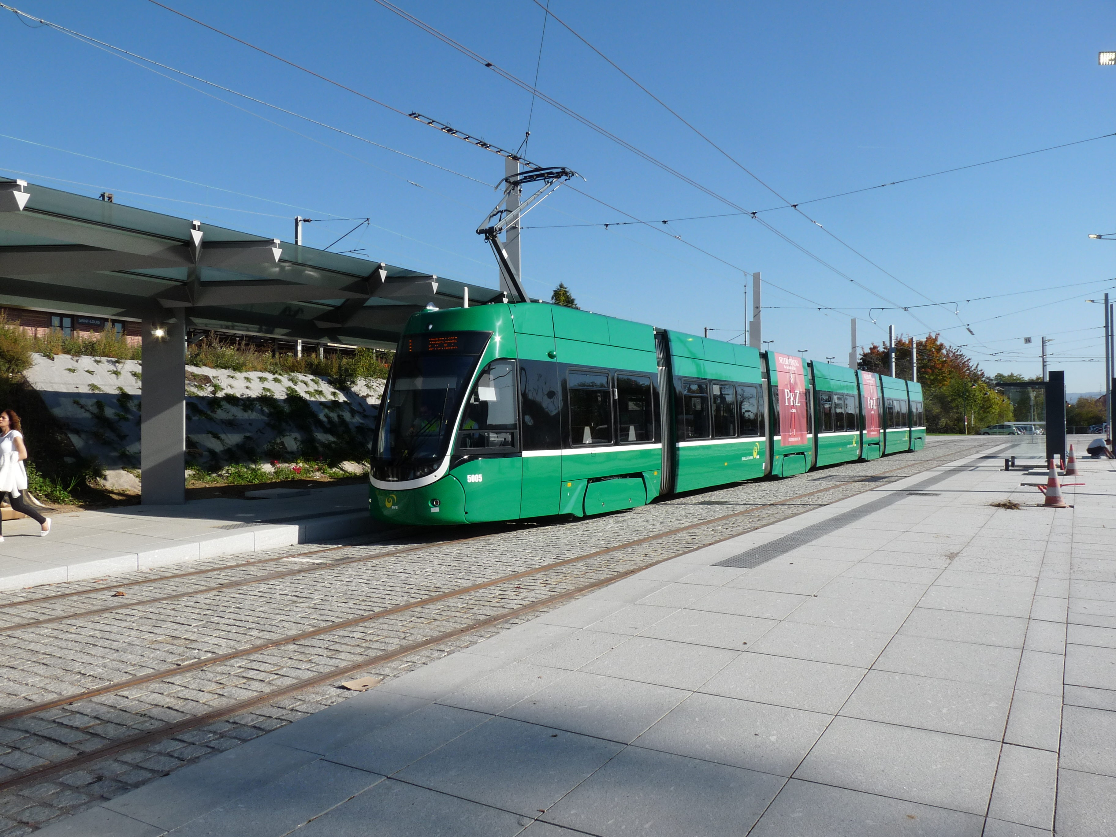 Tramlijn 3 verlenging naar Saint-Louis, Frankrijk. Hier een testrit.